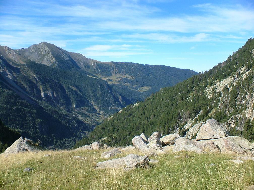 Tuc de la Comamarja i Serra de Llats; la Vall de Boí, Alta Ribagorça, Catalunya